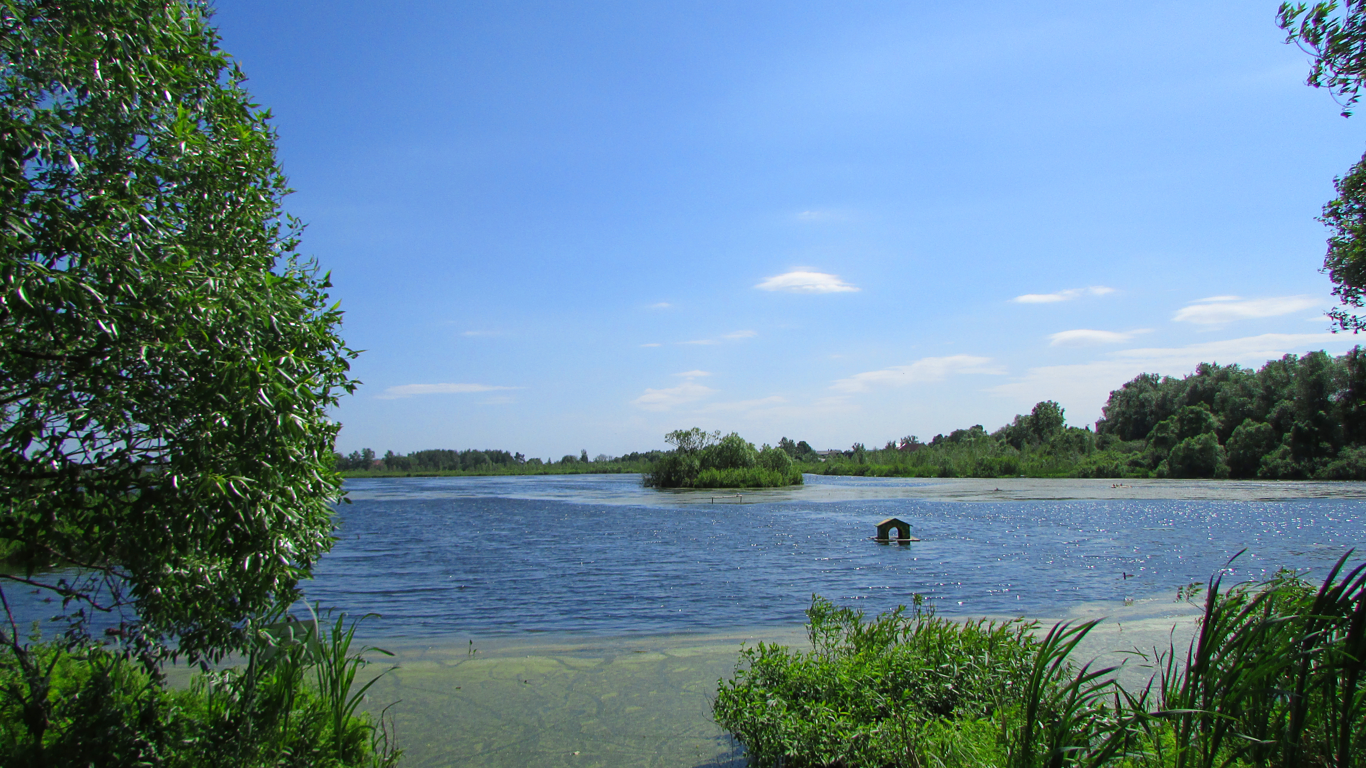 Kiovo lake. Last day of spring. May 2014. / Озеро Киово. Последний день весны. Май 2014.